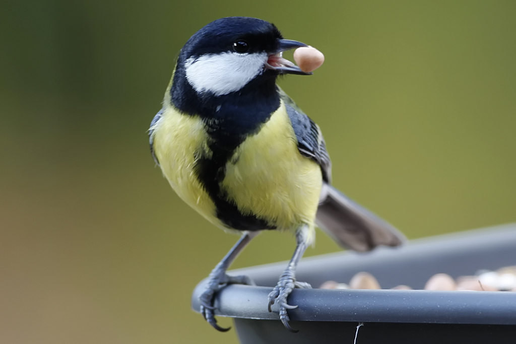 Koolmees (Great Tit)